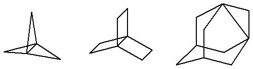 Propellanes